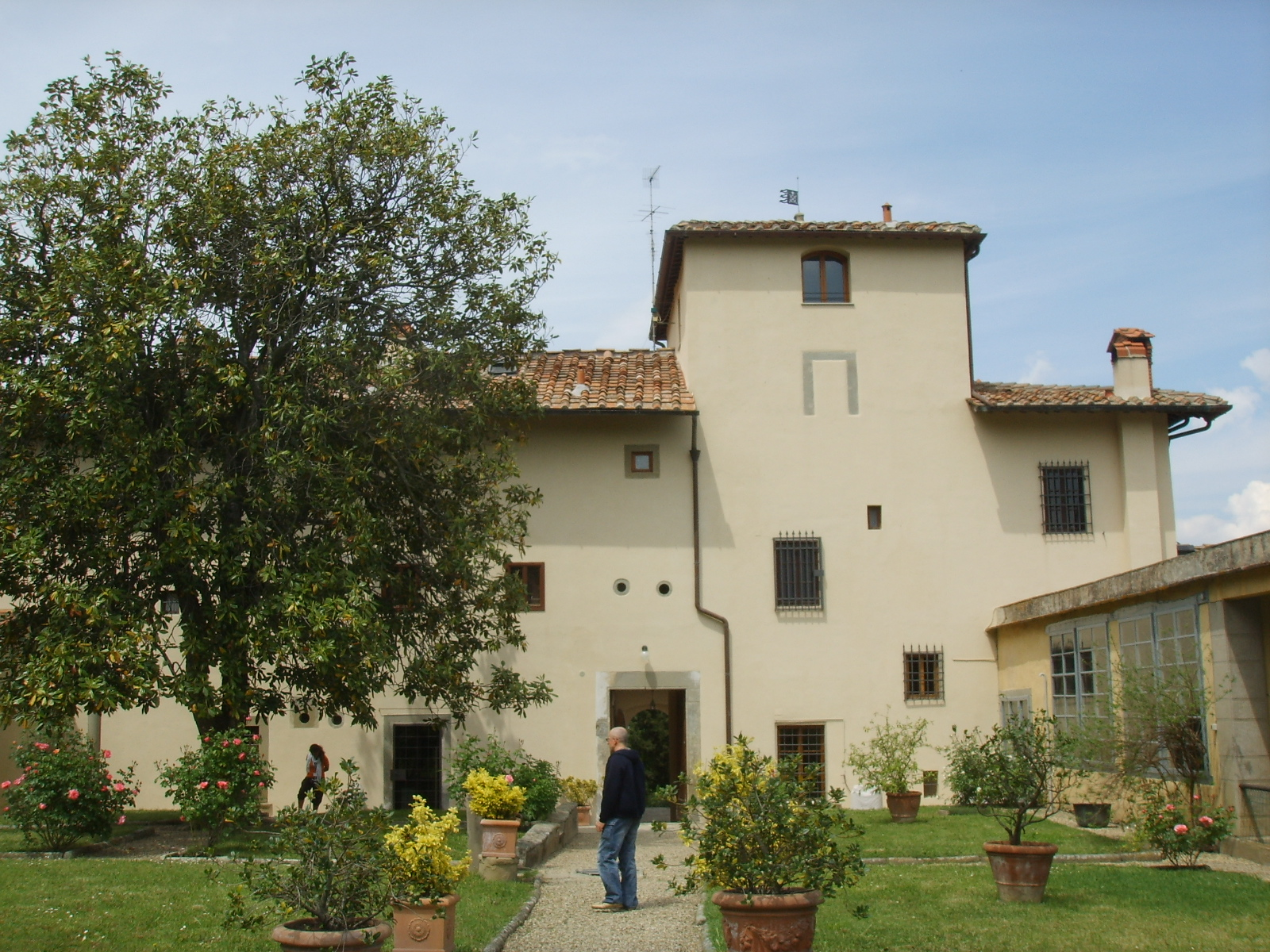 Villa il rinuccino